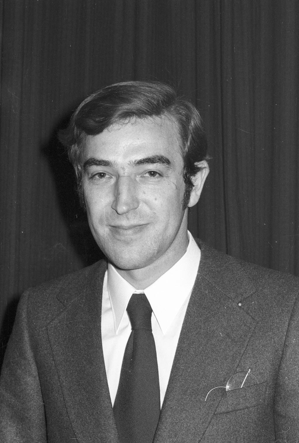 Gansel tritt im Wahlkreis 6 (Kiel) für die SPD an.